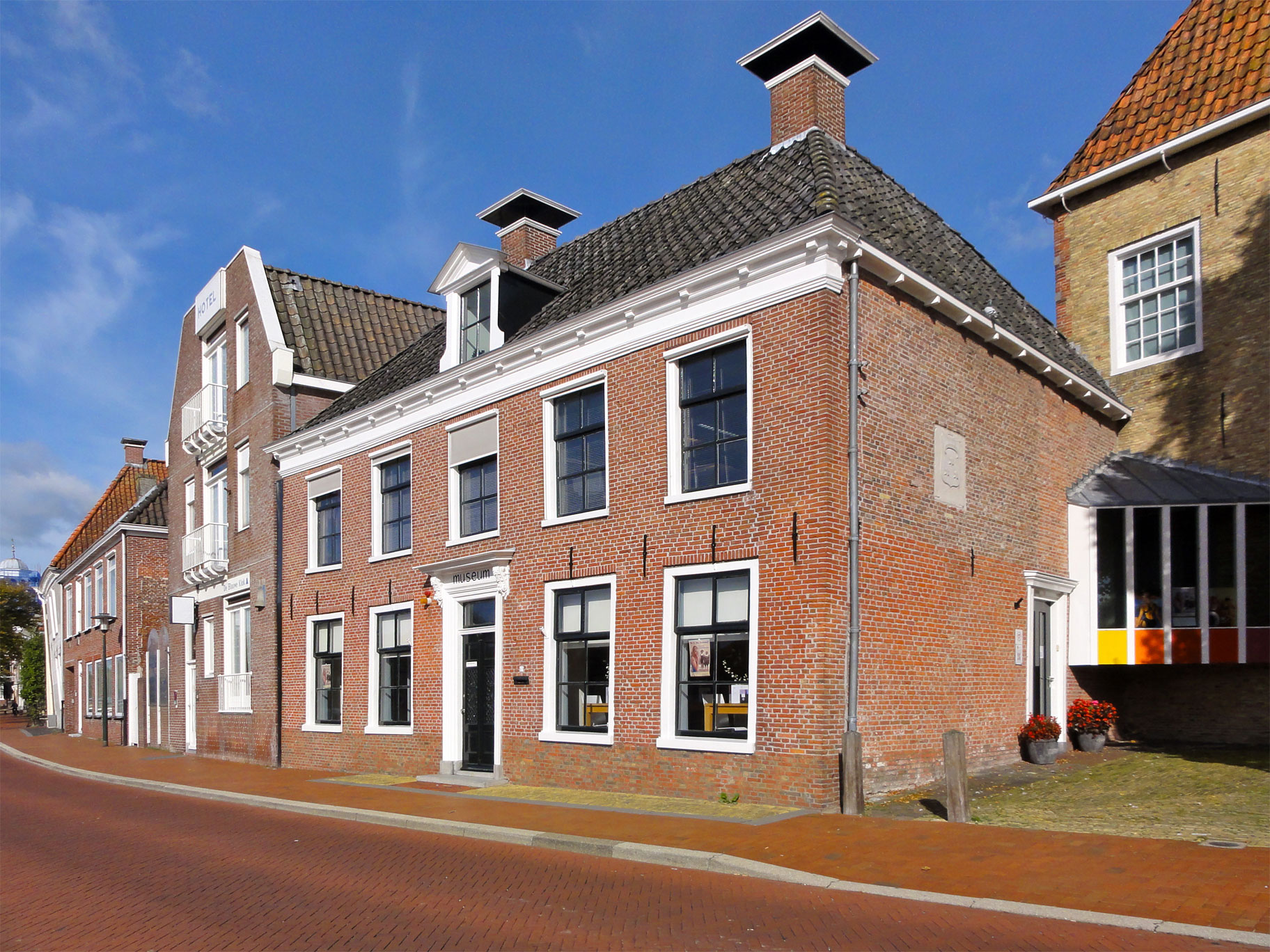 Diepswal 27, Dokkum, rijksmonument